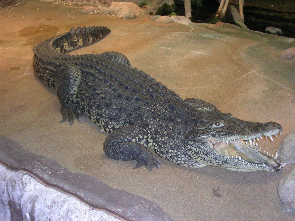 Crocodylus rhombiferᅠ